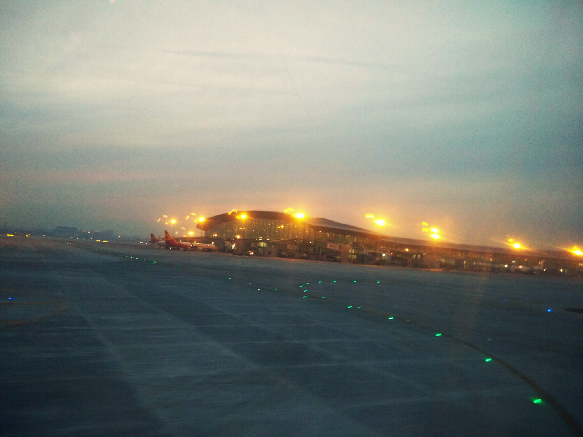 天津滨海国际机场T2航站楼南部